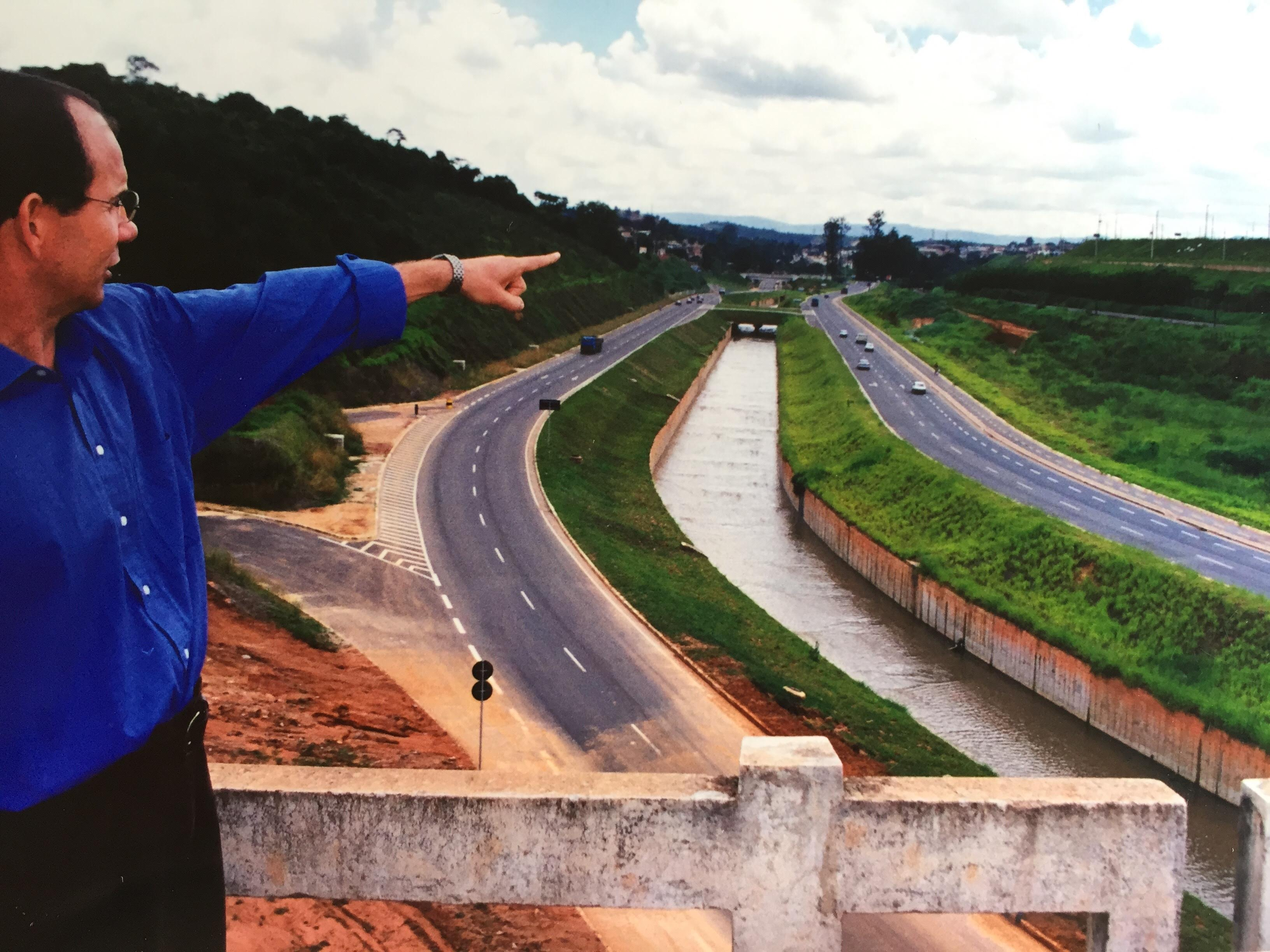 Construída pelo então prefeito Jésus Lima